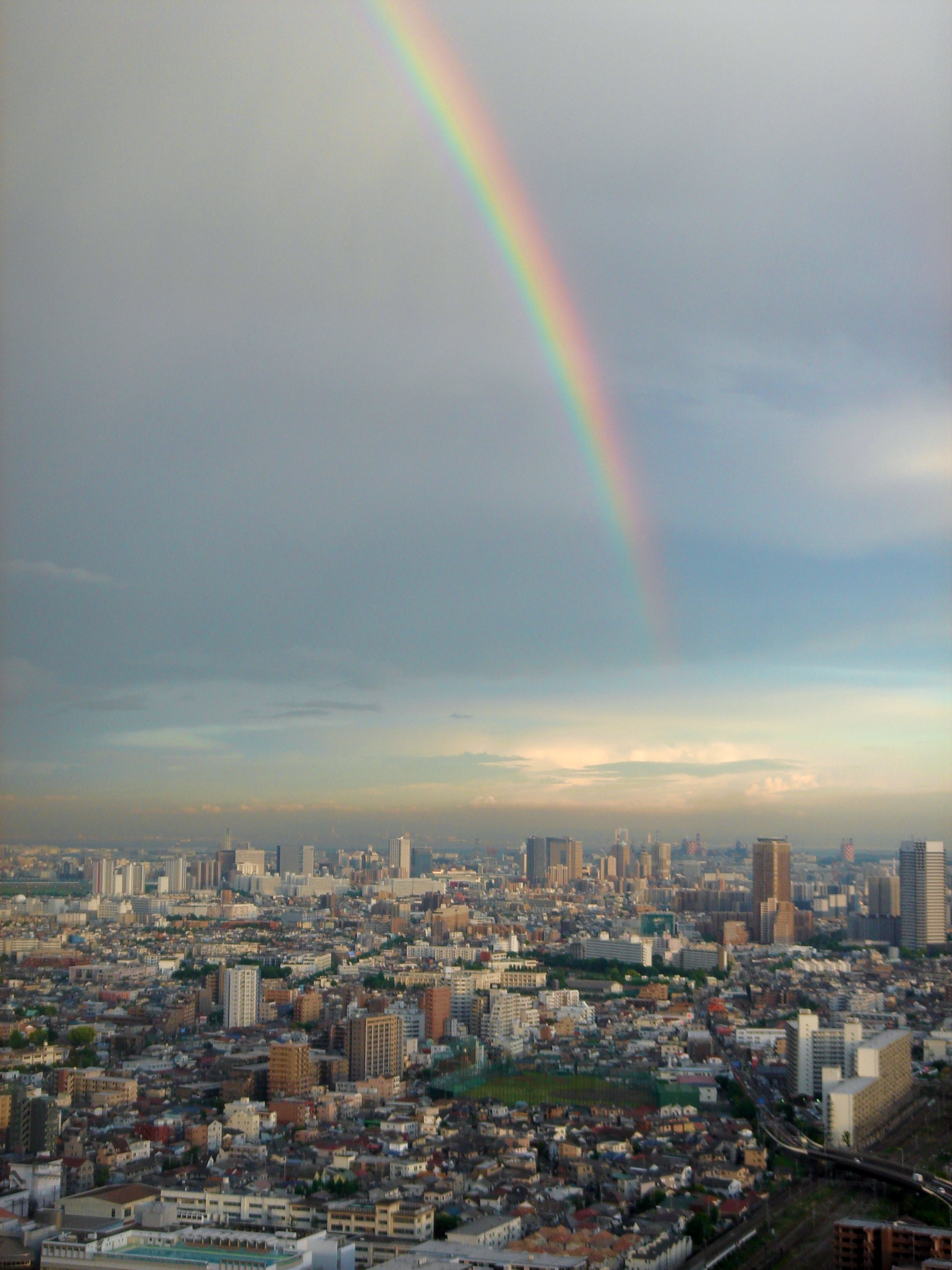 Rainbow (Kawasaki city)